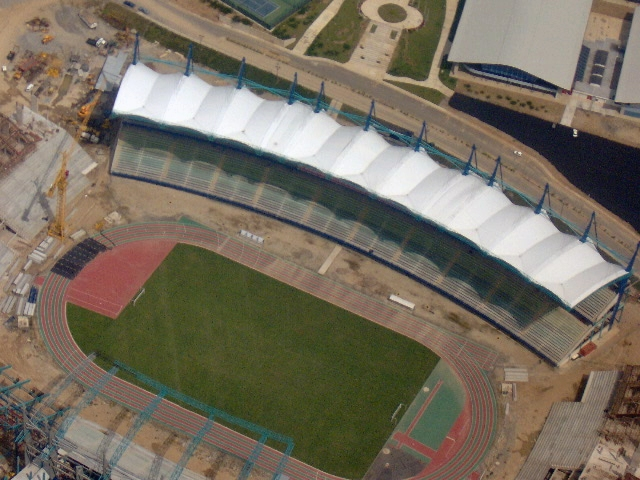 Estadio 5 águilas blancas